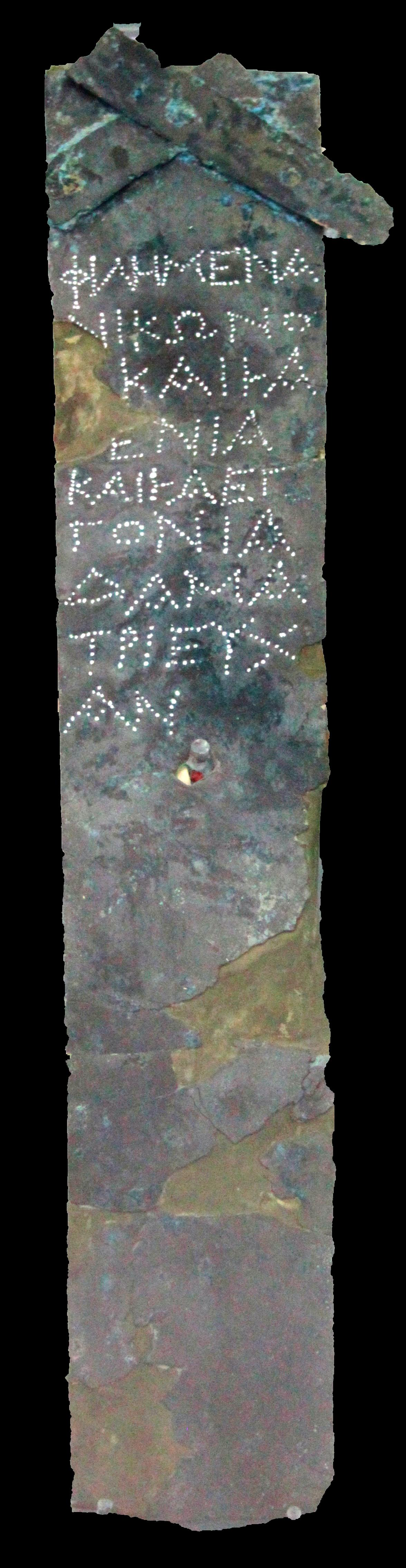 Lamina in bronzo, risalente al III secolo a.C., in alfabeto dorico-tarantino, nella forma della fiaccola di Demetra. Dal Santuario di Demetra rinvenuto in Santa Maria d'Anglona. Conservata al Museo nazionale archeologico di Policoro. Il testo recita: "Philemena figlia di Nikonos e i suoi figli e nipoti [indirizzano] a Demetra una preghiera"